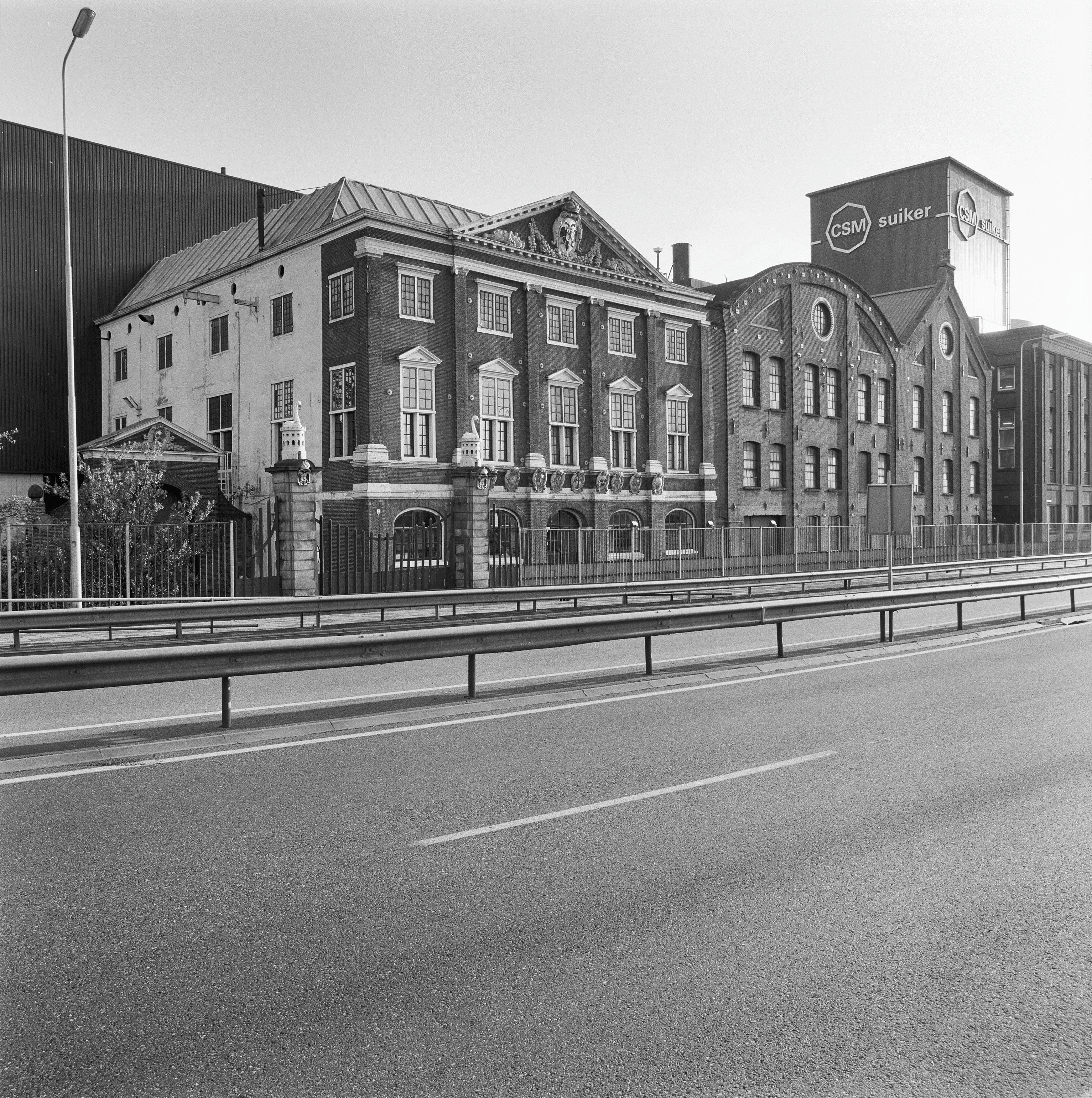 GEMEENTEHUIS SWANENBURGH: Exterieur OVERZICHT, MET GEBOUWEN SUIKERFABRIEK